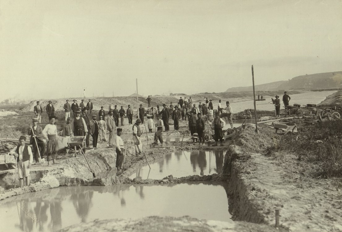 Работници при строежа на временния канал между Варненското езеро и Черно море.